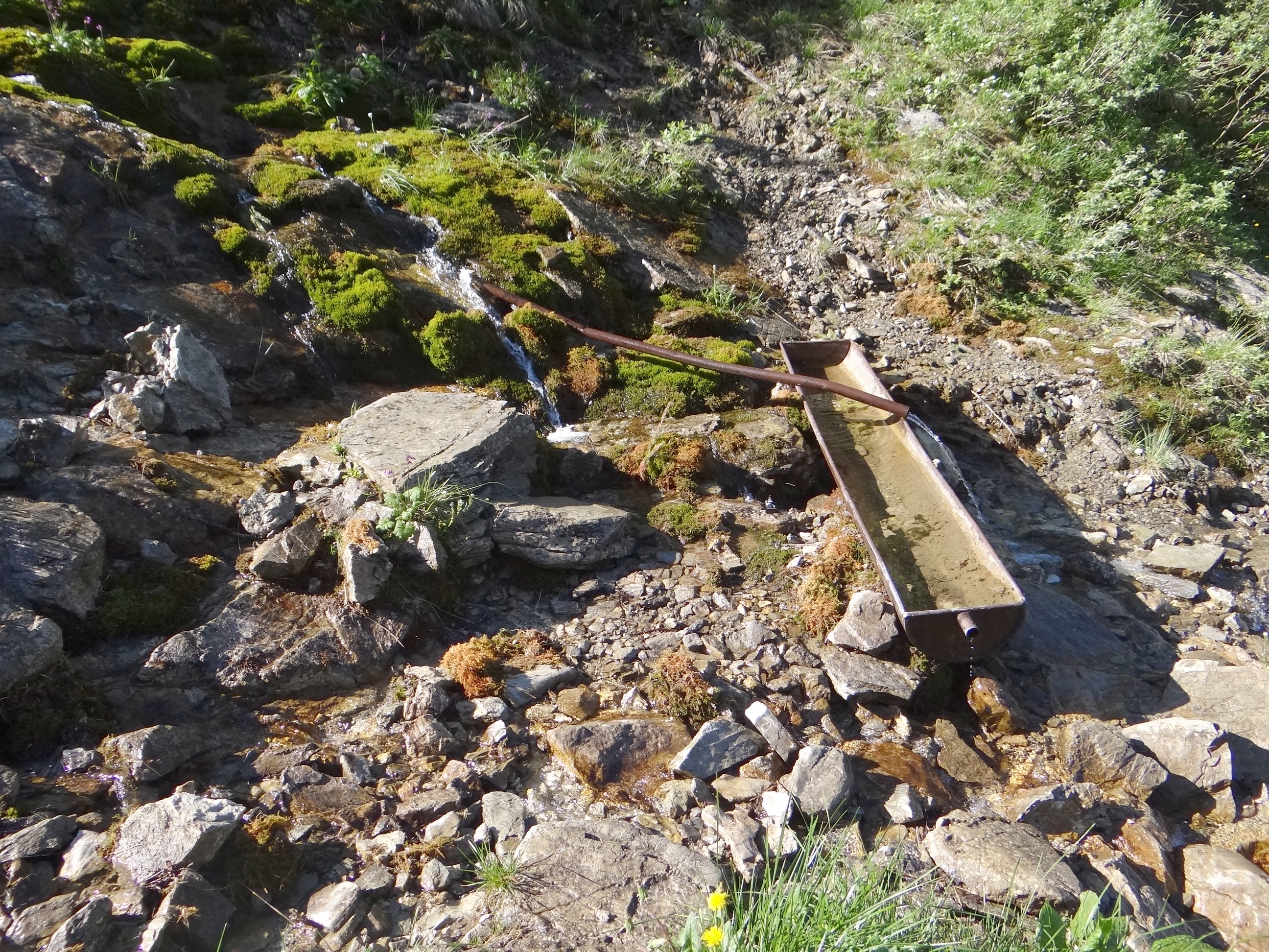 Necpalská dolina